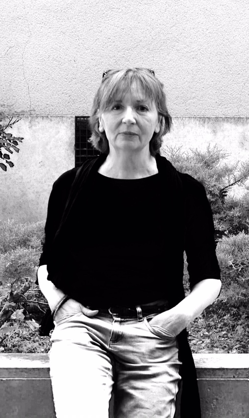 autorica Ljiljana Filipovic portrait